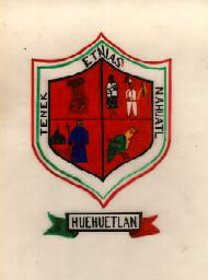 Escudo del pueblo de San Luis Potosí llamado Huehuetlán